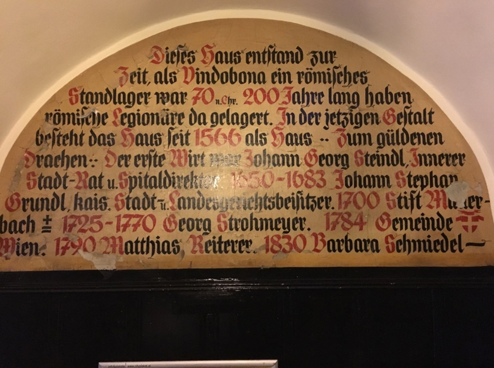 Gösser Bierklinik Detail